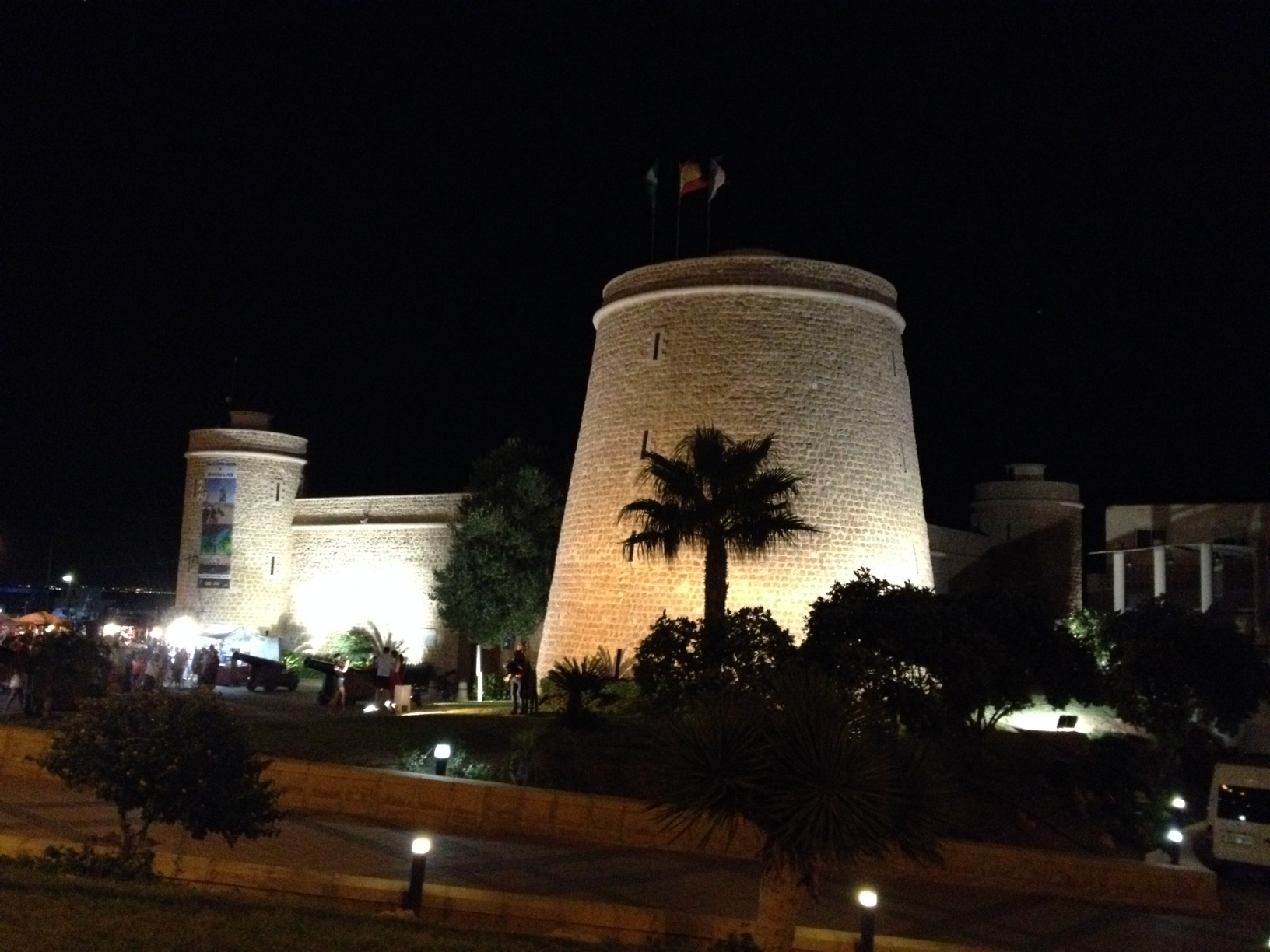 Castello in notturna